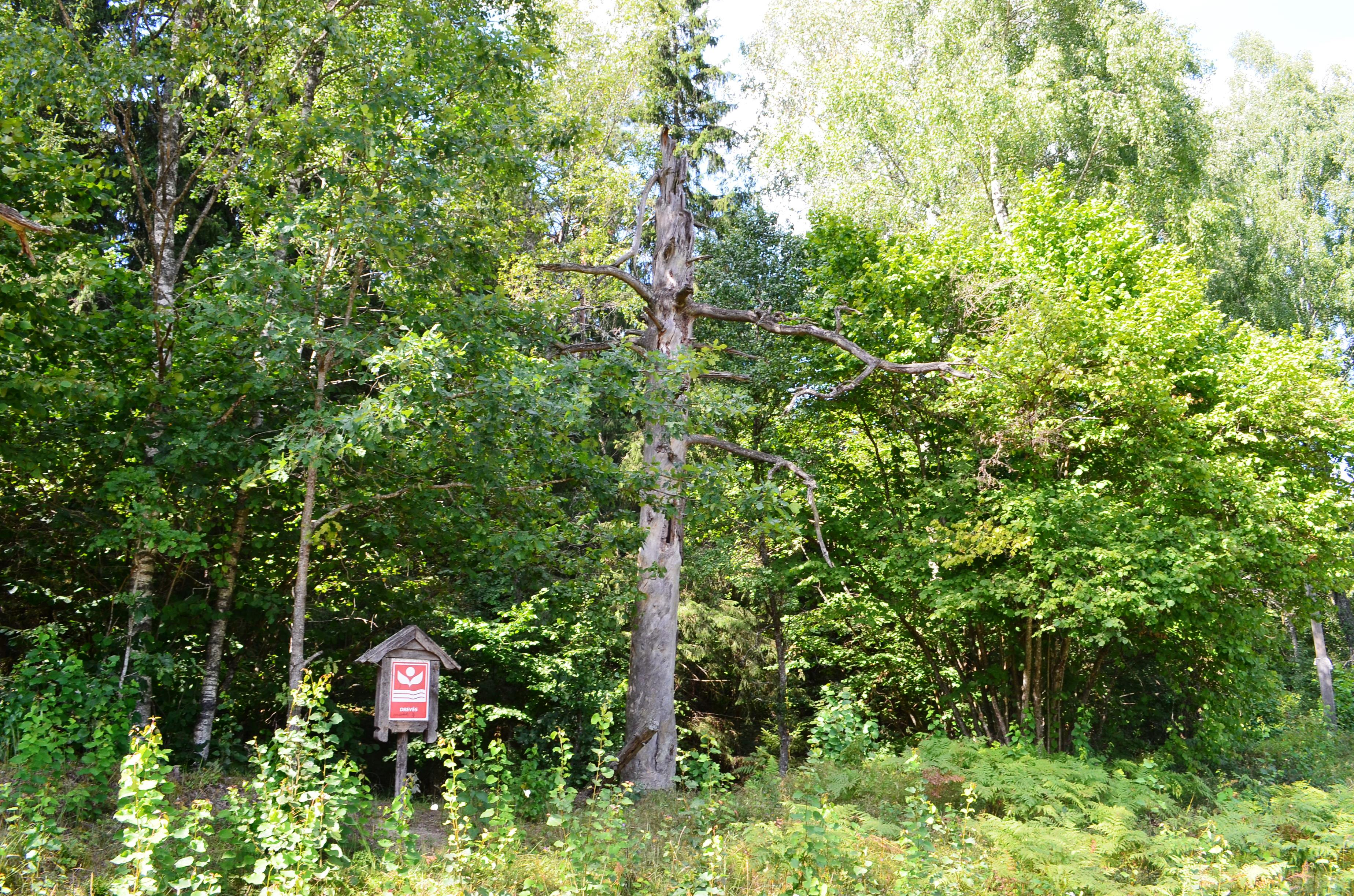 Drevėtoji pušis Zervynose, Varėnos r.